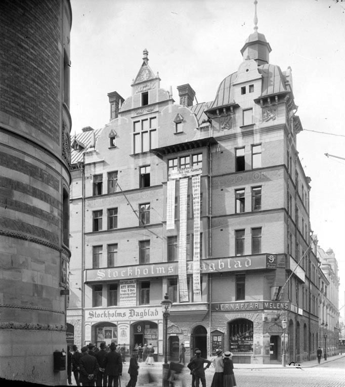 Stockholms Dagblad, Vasagatan 9. Till höger Bryggaregatan.